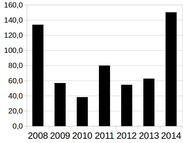 Отток капитала из РФ, млрд долл. Источники: [1] [2] [3] [4] [5] [6] [7] ↑ ↑ ↑ ↑ ↑ ↑ ↑